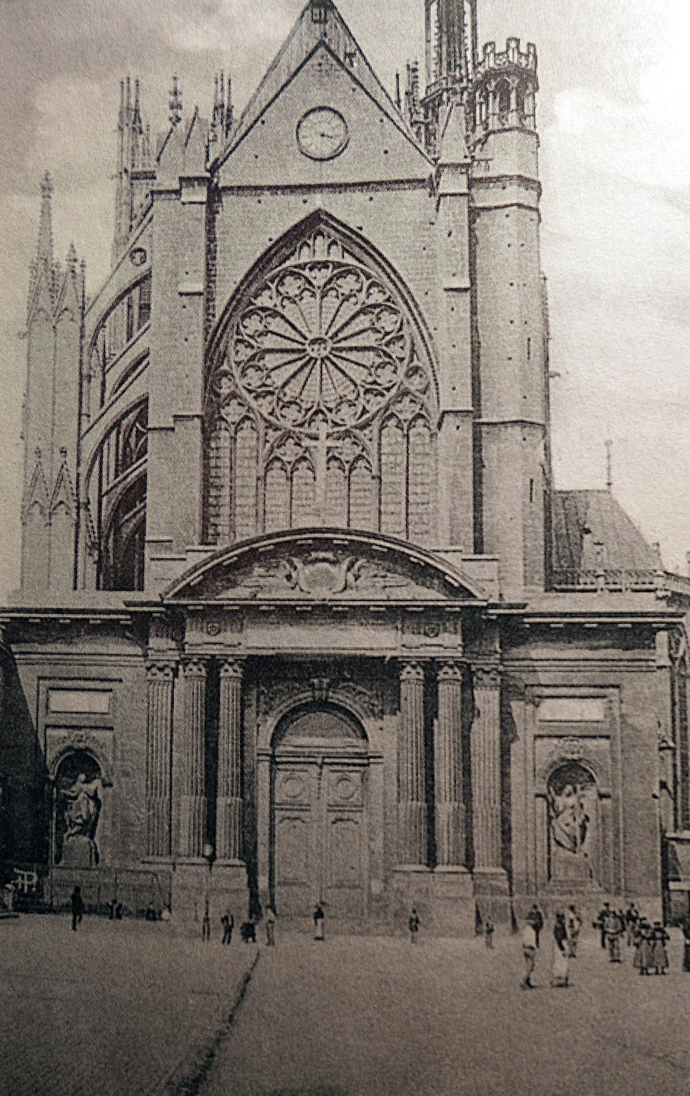 Southern facade of Cathédrale Saint-Étienne de Metz; Das klassizistische Portal von Blondel vor der vollständigen Umgestaltung durch Paul Tornow (Metzer Dombaublatt 7, Tafel IV)